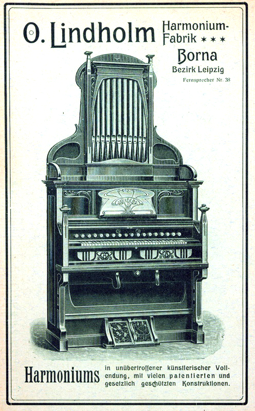 Anzeige der O. Lindholm Harmoniumfabrik aus Borna im Bezirk Leipzig mit einer Abbildung eines Harmoniums des Unternehmens mit der seinerzeitigen Fernsprech-Nummer 38 und der Untertitelung „Harmoniums in unübertroffener künstlerischer Vollendung, mit vielen patentierten und gesetzlich geschützten Konstruktionen.“ ...